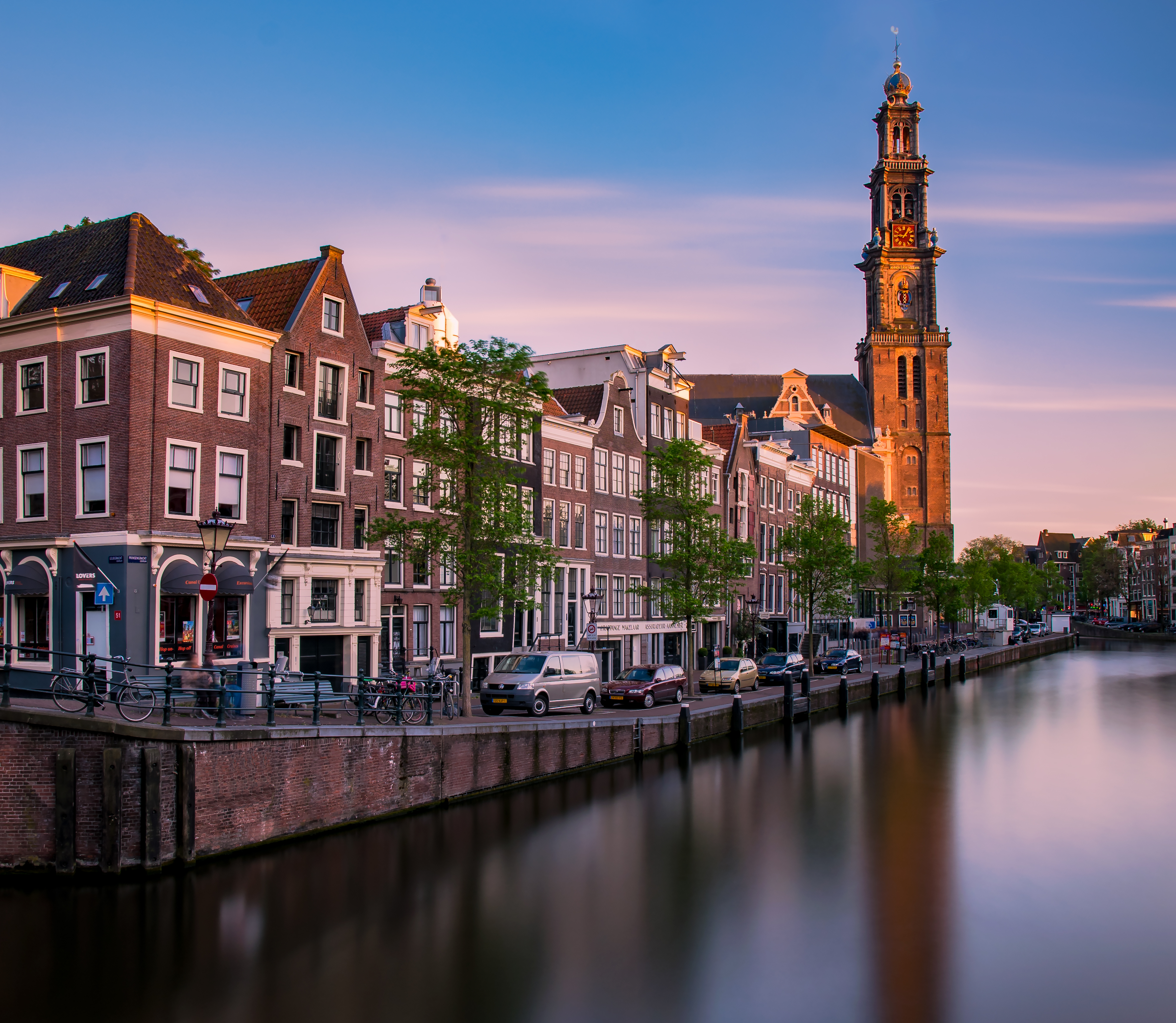 Westerkerk Amsterdam